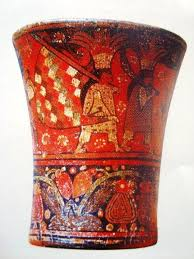 En este Vaso Qiru se puede apreciar claramente un guerrero portando una wiphala, lo pueden encontrar en el Museo Arqueológico del Cusco